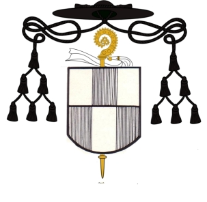 Wappen Leonard Gnetzamer, † 1566, Abt von Münsterschwarzach (1551-1556)